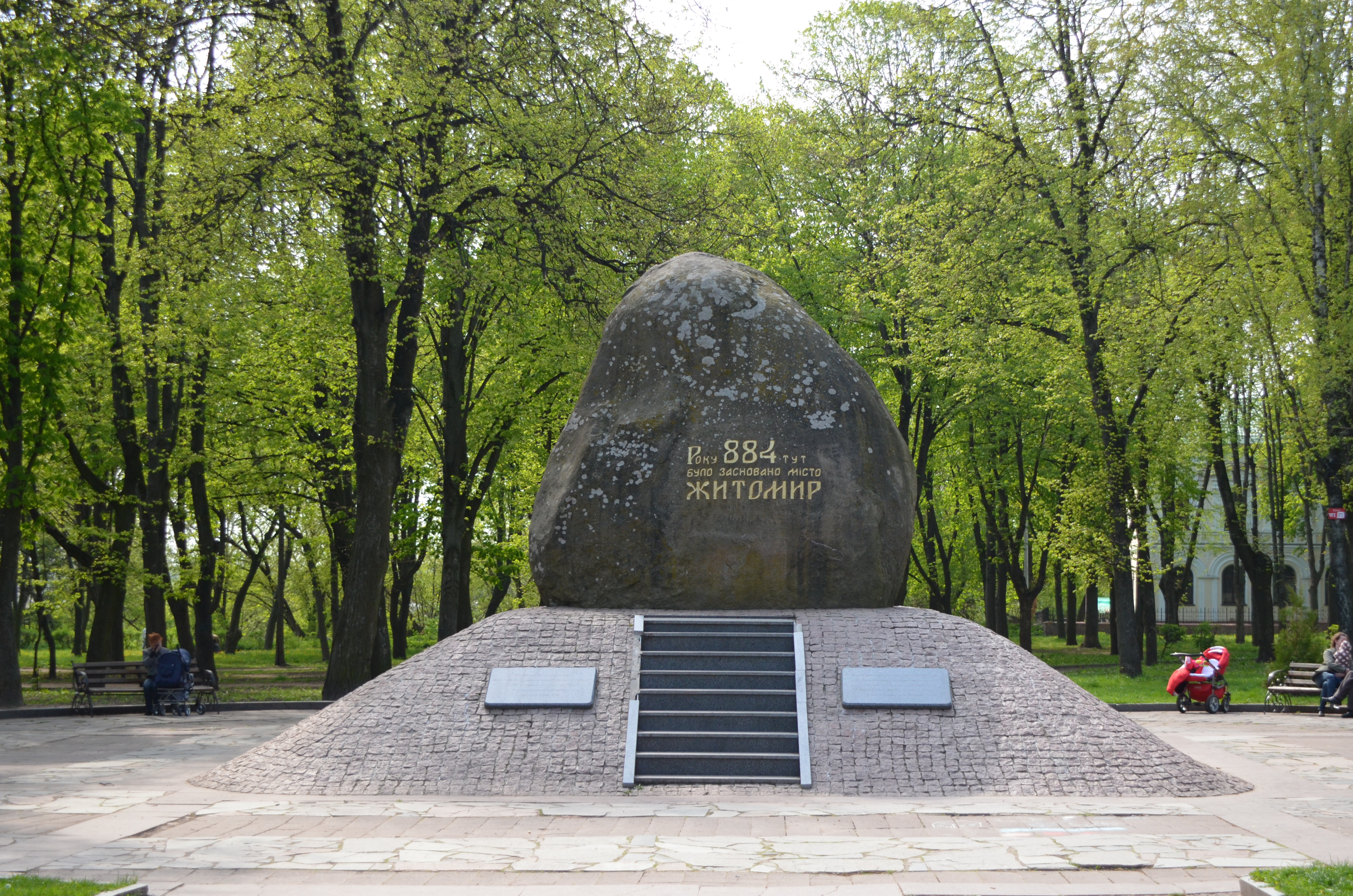 Камінь на честь заснування Житомира у 884 році